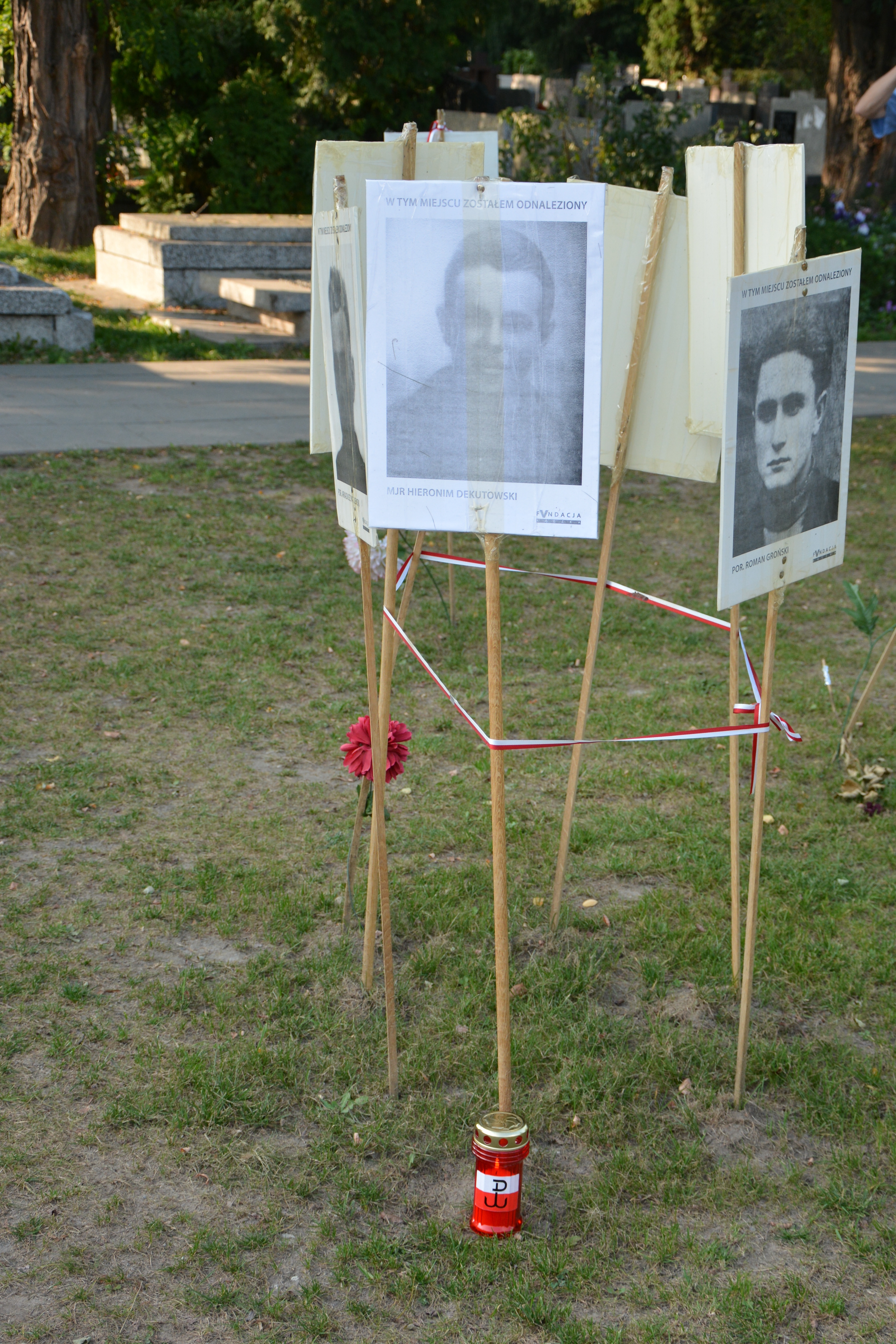 Miejsce znalezienia szczątków Mjr Hieronima Dekutowskiego na Powązkach